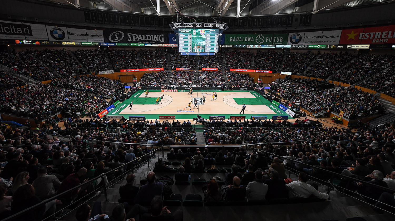 Pavelló Olímpic de Badalona durant un partit de Lliga ACB entre Club Joventut Badalona i Futbol Club Barcelona